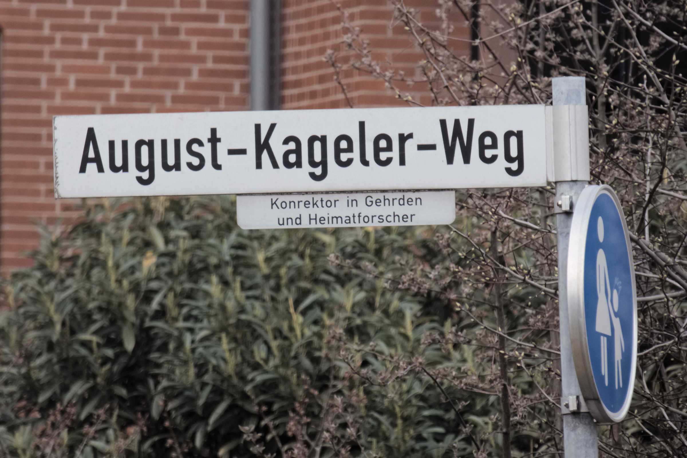 Straßenschild in Gehrden, Region Hannover. August Kageler (* 1877 in Altenhagen I; † 19. Juni 1965 in Gehrden) war ein deutscher Lehrer, Autor und Heimatforscher.